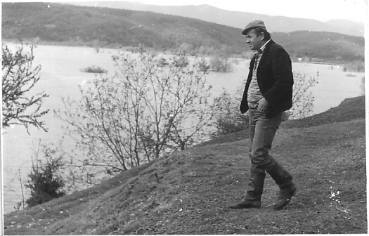 До язовира